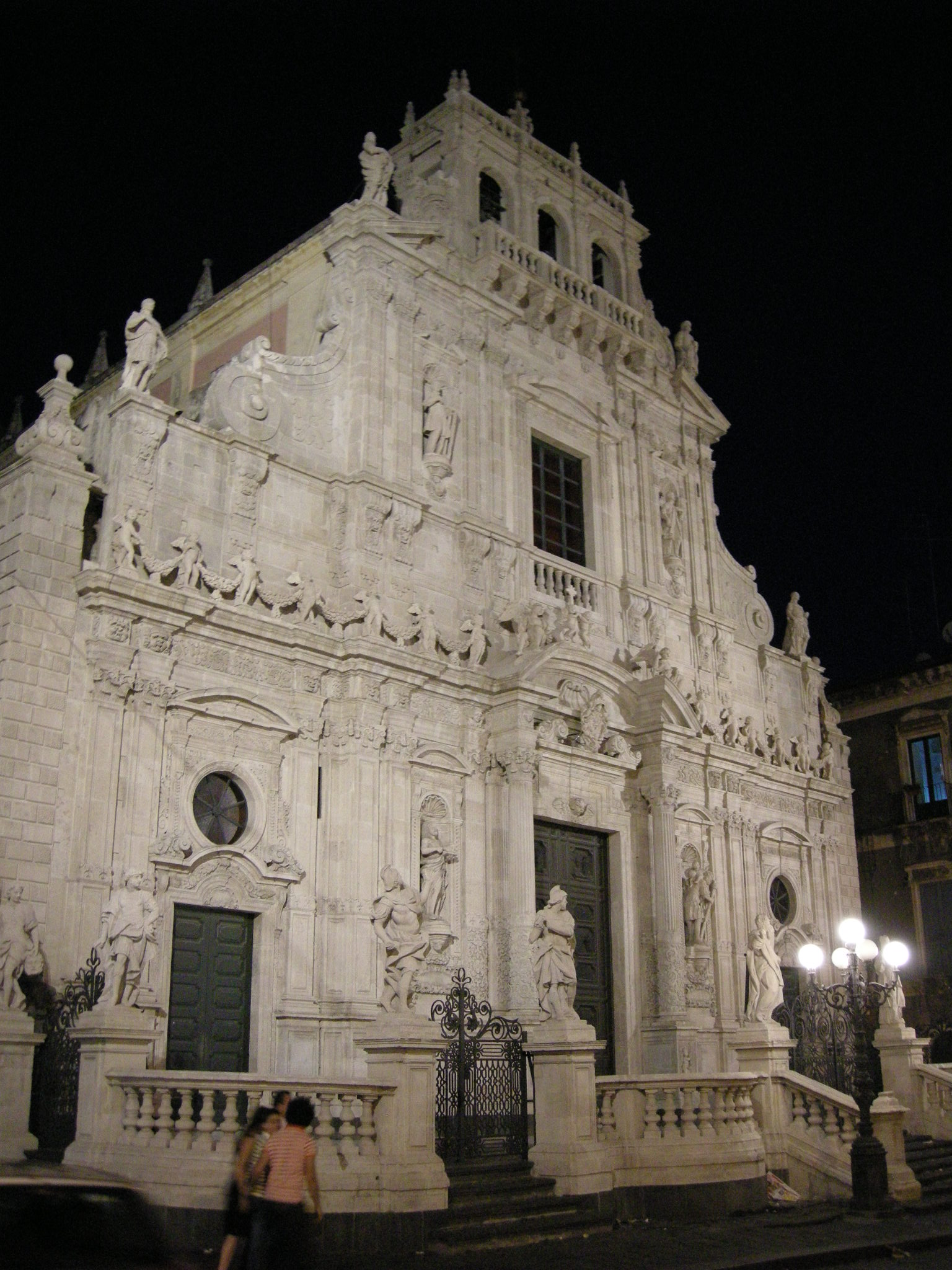 Acireale, san sebastiano